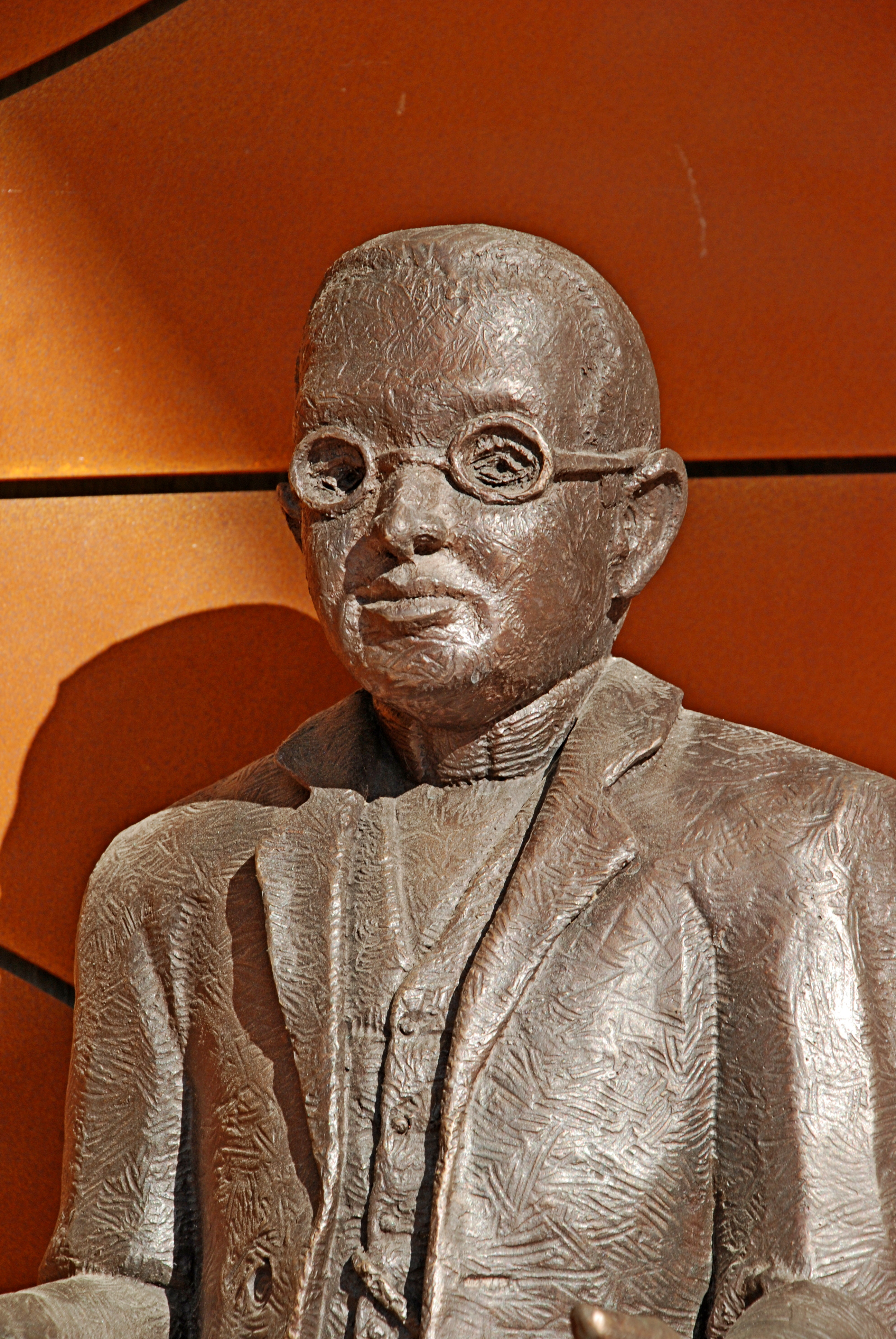 Belgique - Louvain-la-Neuve - Place des Sciences - Georges Lemaître - Gigi Warny